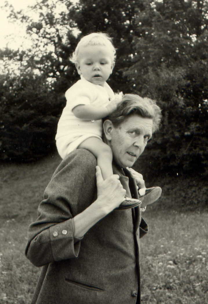 Bernt von Heiseler in Vorderleiten mit seinem Enkel Till auf den Schultern